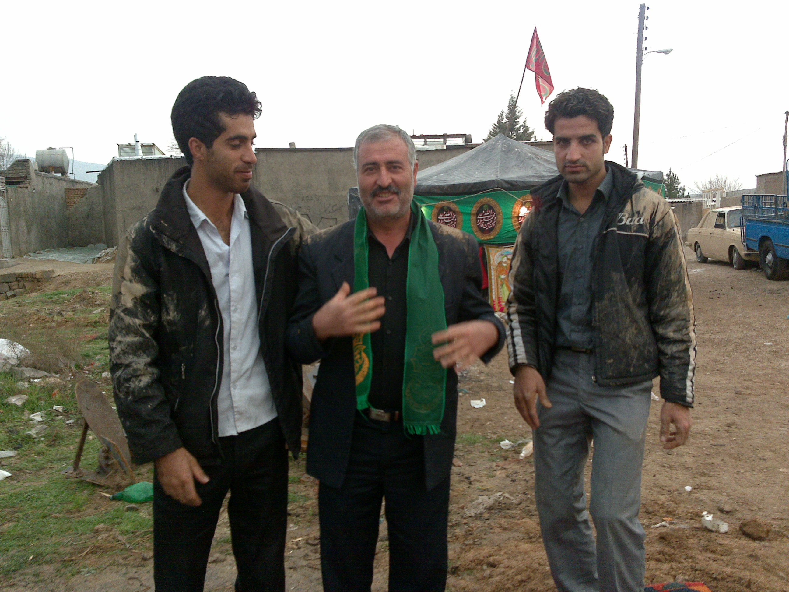 مداح اهل بیت صفر قلی امیری